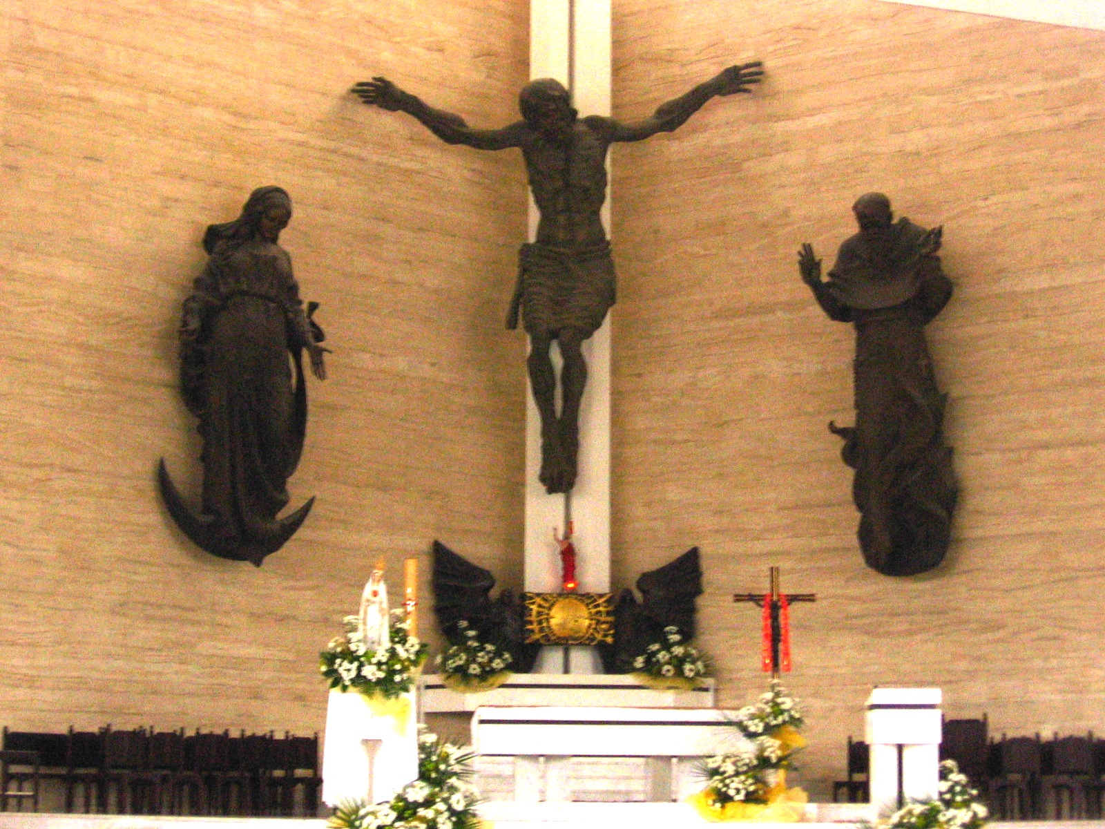 prezbiterium kościoła pw. sw. Maksymiliana na osiedlu Tysiąclecia w Krakowie